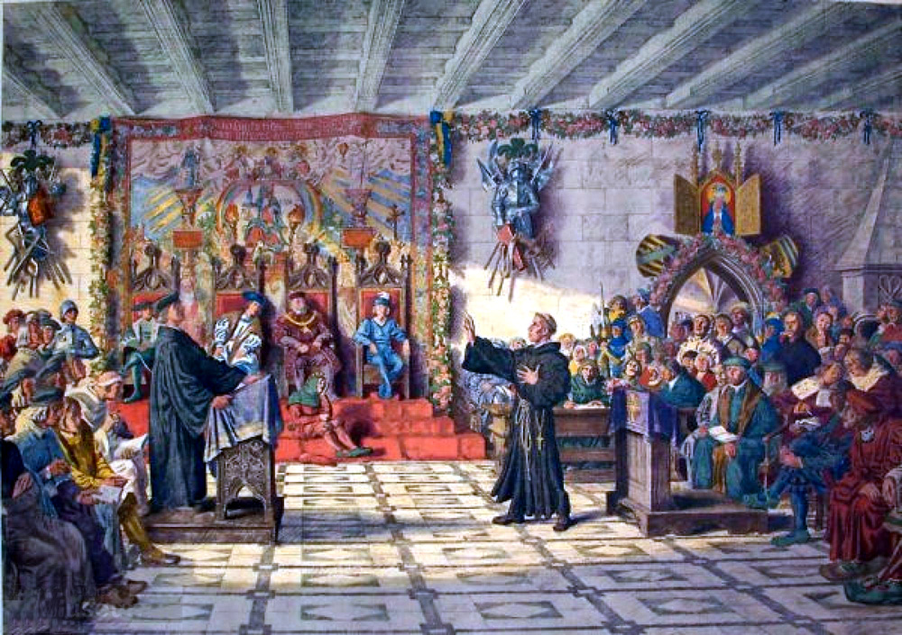 Die Leipziger Disputation 1519. Lithographie von Max Seliger